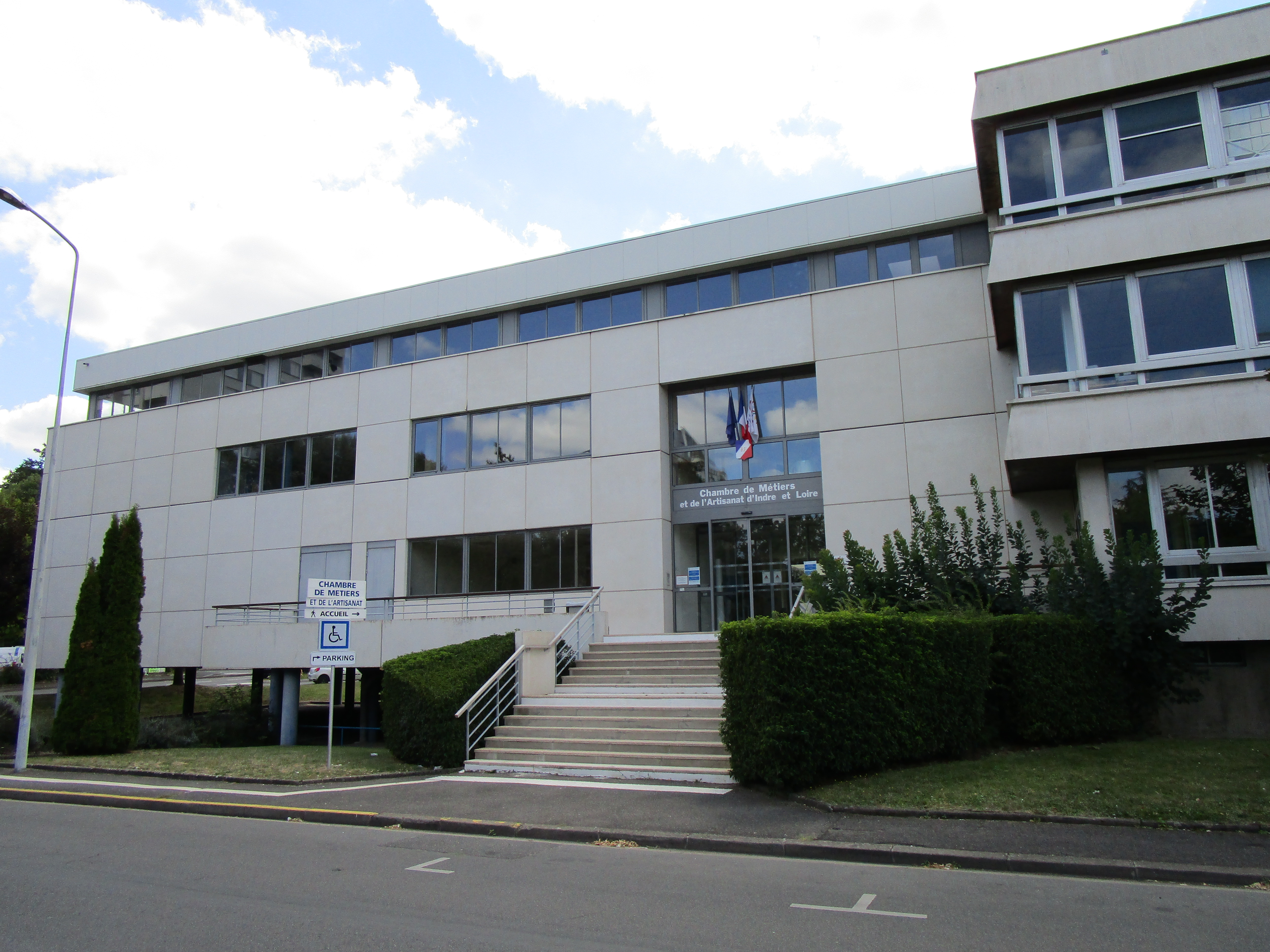 La Chambre de Métiers et de l'Artisanat d'Indre-et-Loire, dans le quartier des Fontaines à Tours.